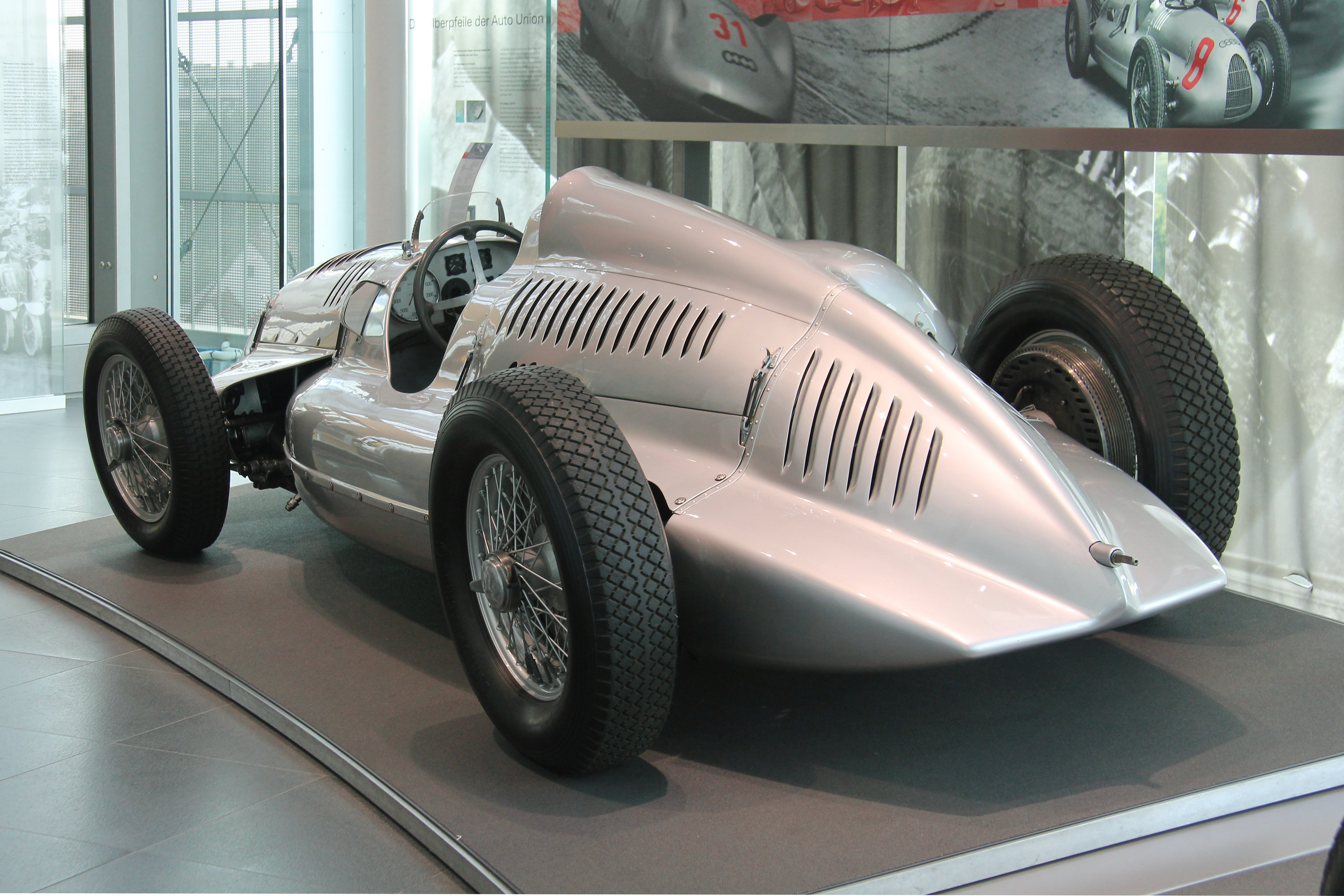 Auto Union Typ D im museum mobile. Rennwagen mit V12-Mittelmotor, 2985 cm³, 485 PS bei 7000/min, Höchstgeschwindigkeit ca. 330 km/h. Bauzeit 1938/1939. Der ausgestellte Wagen ist einer von dreien, die den Krieg überdauerten. Zwischen 1992 und 1994 wurde er in England restauriert.